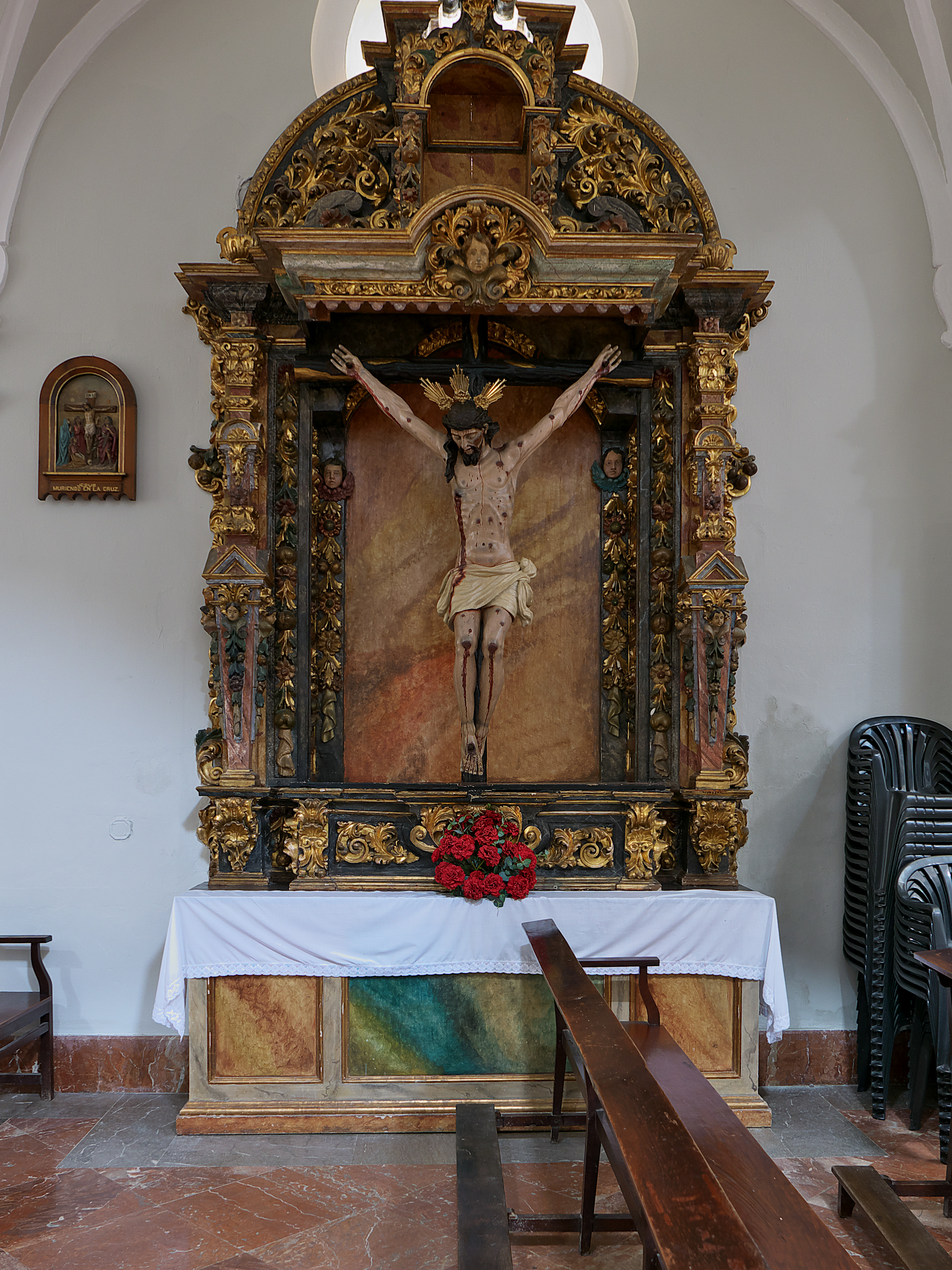 Imagen titular de la Real e Ilustre Hermandad Sacramental y Capitular de Nuestro Padre Jesús de las Cadenas, Santísimo Cristo de Jerusalén y Buen Viaje y María Santísima de los Dolores.